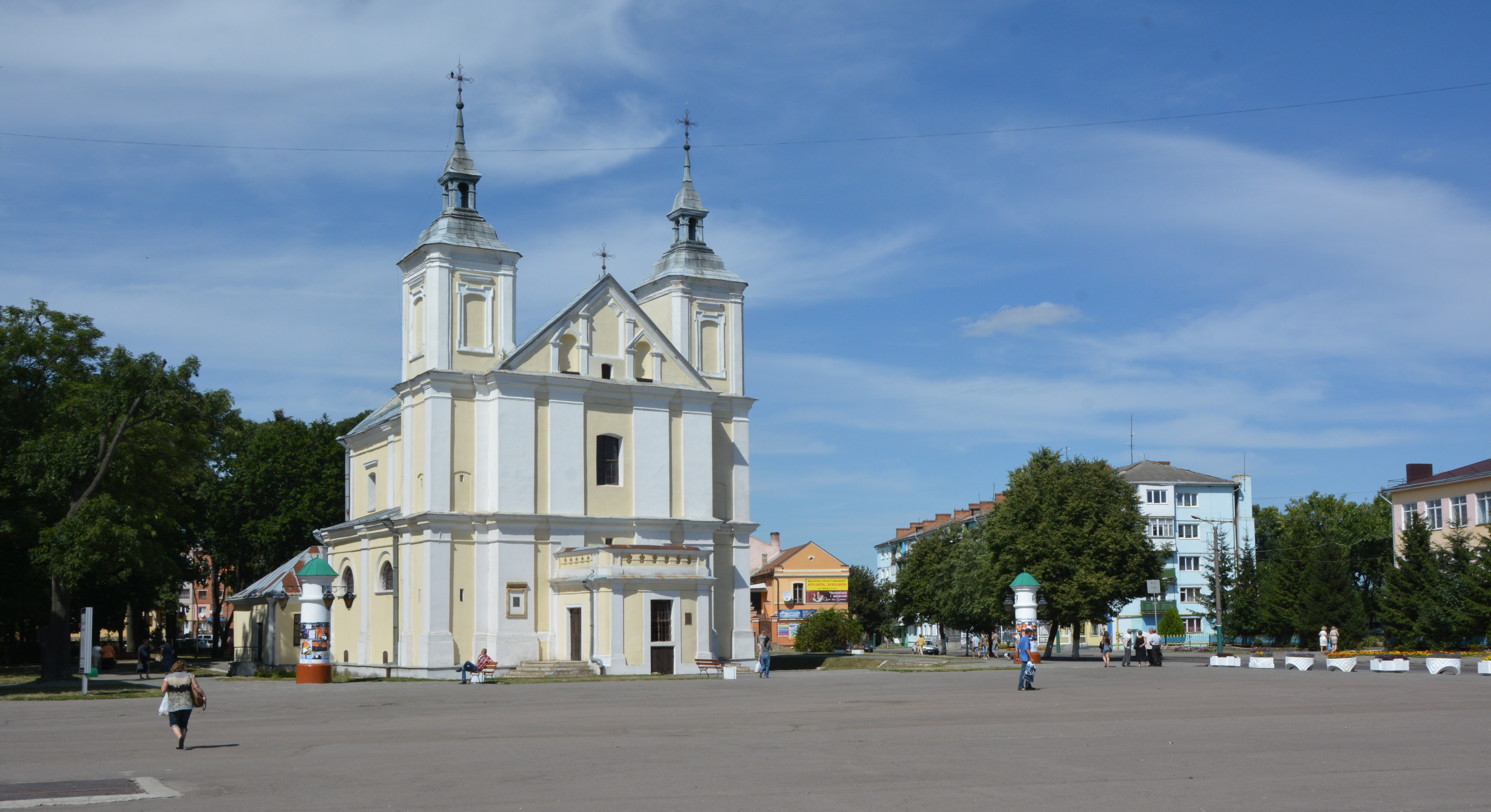 Костел Іоакима і Анни (мур.), Володимир-Волинський, вул. Князя Василька, 2